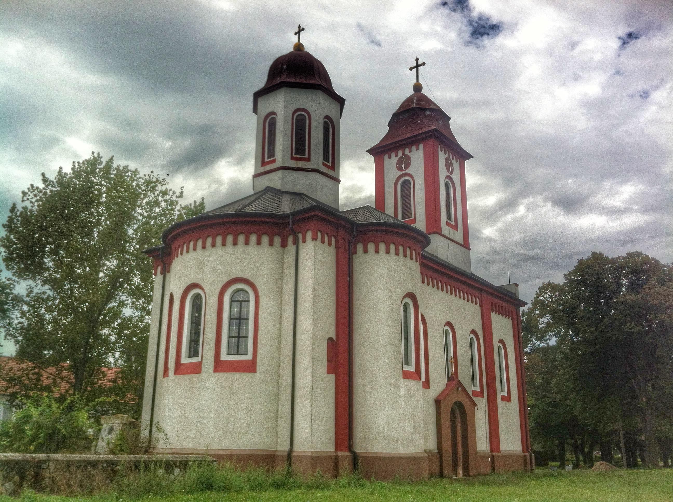 Српски (ћирилица): Саграђена 1870-е године мада постоји и податак да је саграђена 1842-е године.